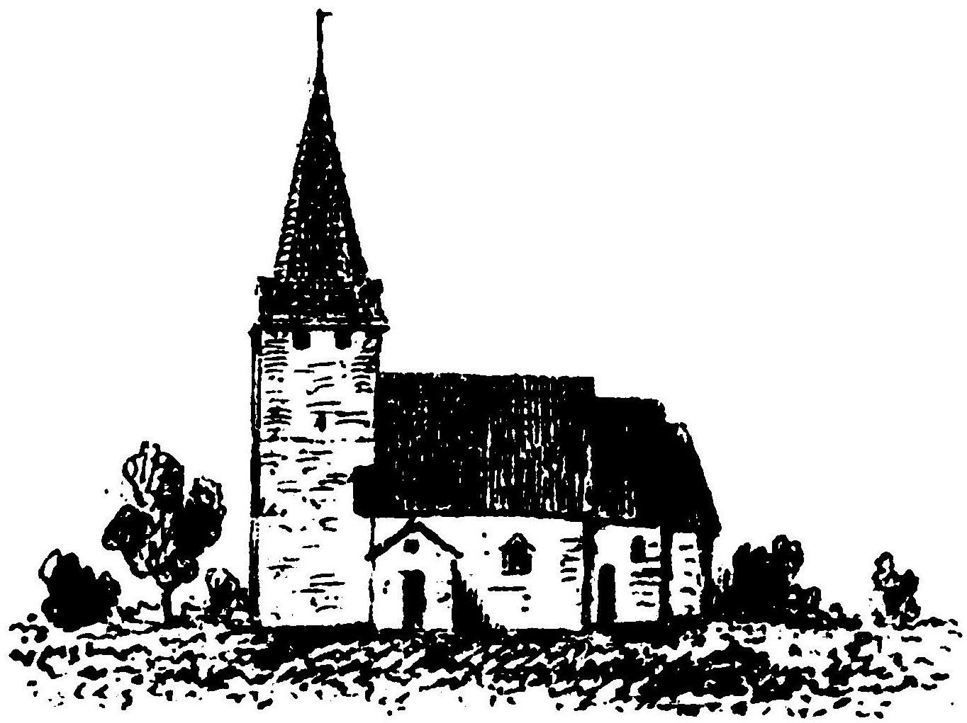 Västra Tollstads gamla kyrka i Östergötland, riven/ombyggd på 1830-talet. Avbildning av en teckning av den gamla kyrkan i Västra Tollstads kyrka, i "Utdrag af Antiqvitets-Intendenten P. A. Säves afgifna berättelse för år 1861", publicerad i Antiqvarisk tidskrift för Sverige band 1, 1864.